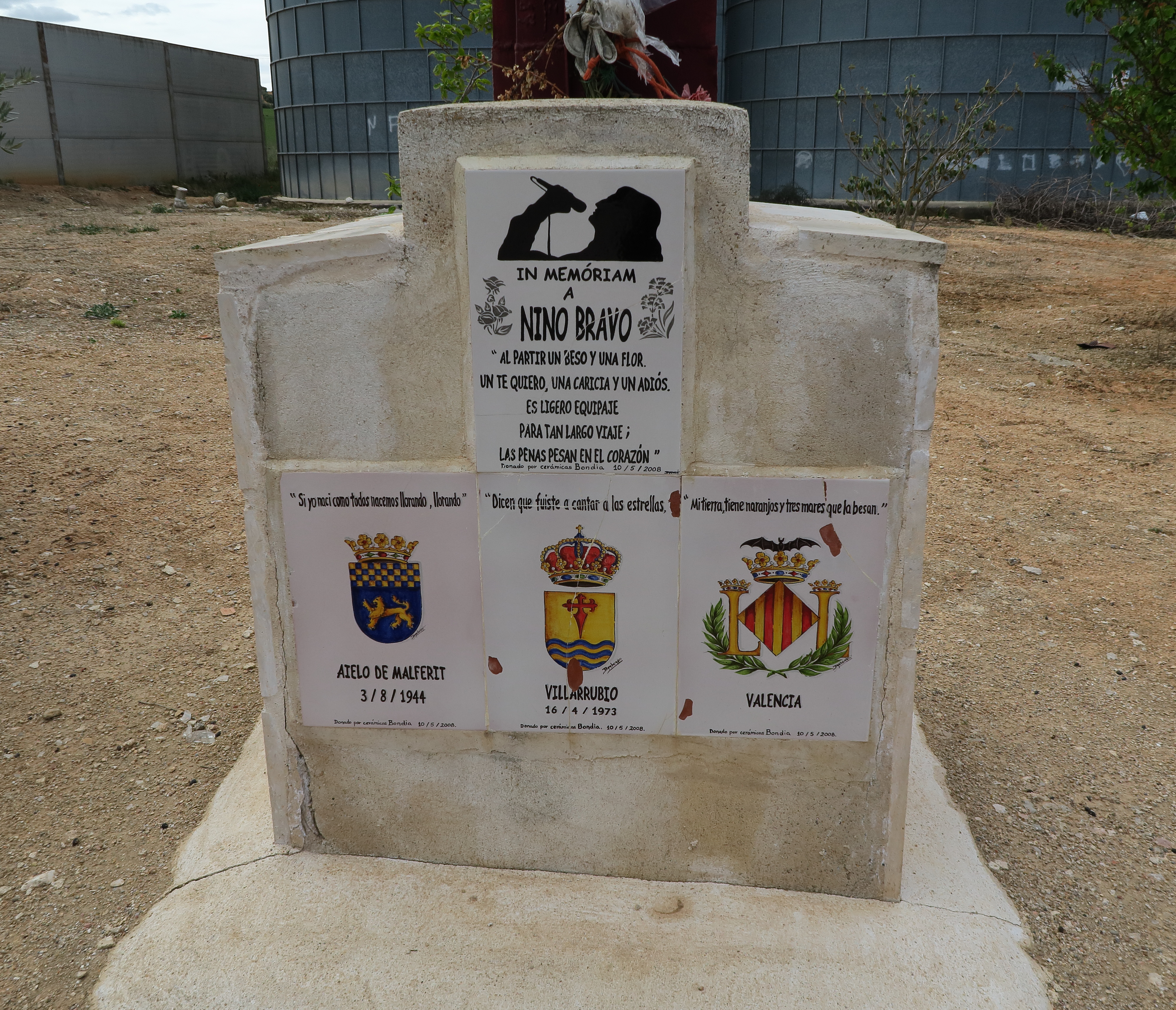 Nino Bravo, monumento en Villarrubio, detalle placas